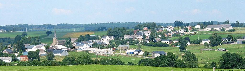 Vue op Gouvy Quell:Copie vum Fichier Gouvy JPG01.jpg vum Jean-Pol Grandmont, geschnidden an opgehellt